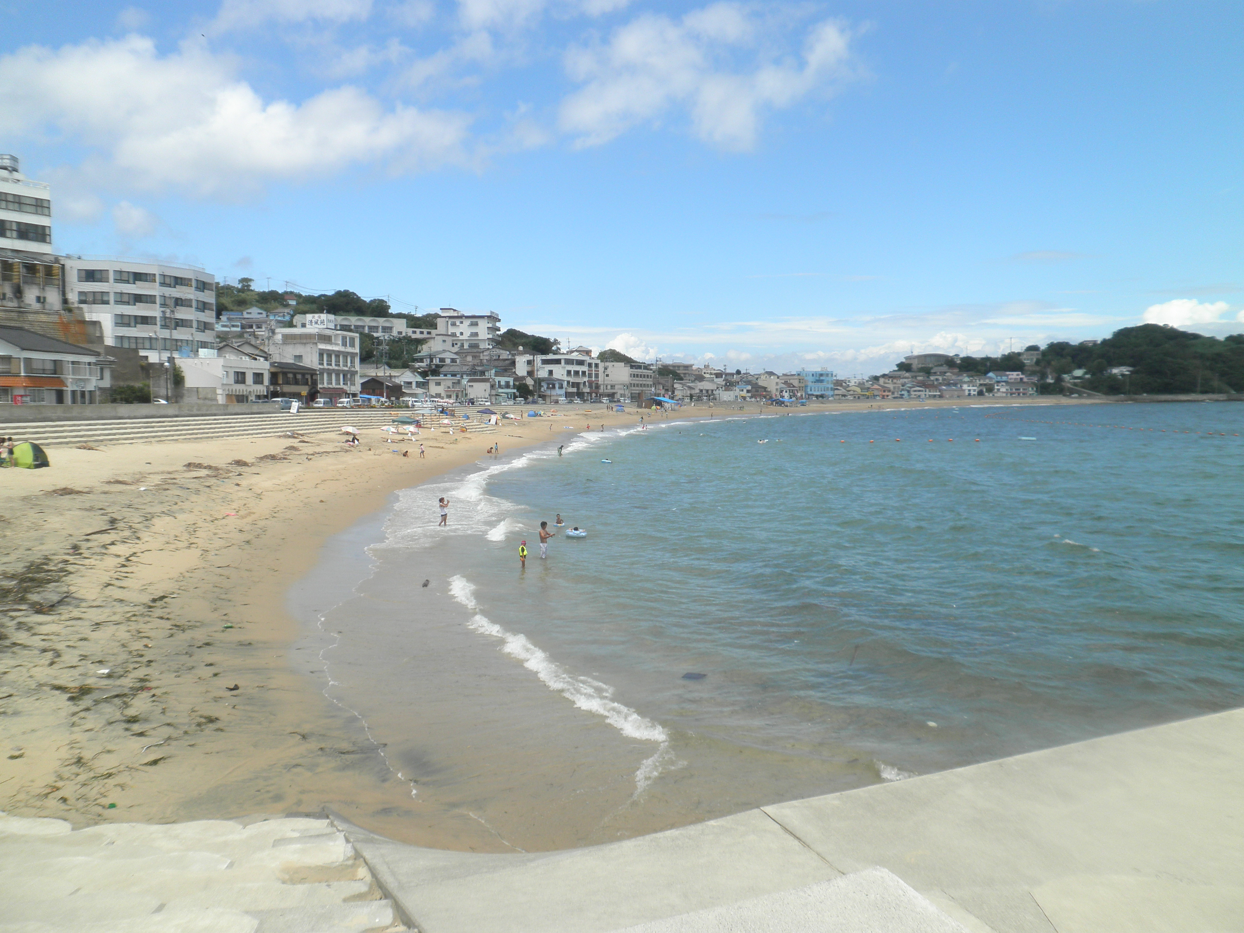 篠島にある前浜さんさんビーチ